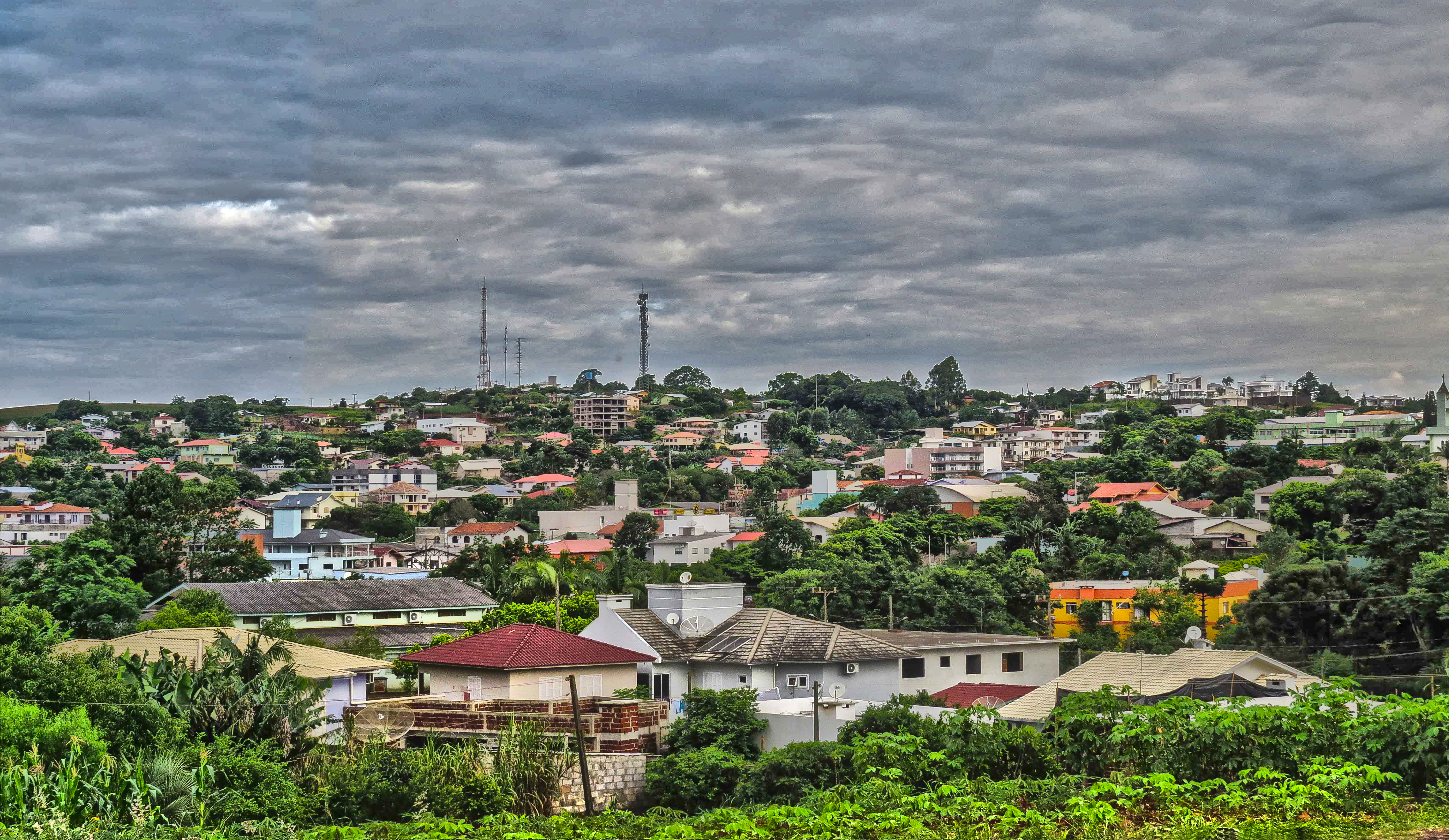 Vista panorâmica da cidade de Iporã do Oeste.